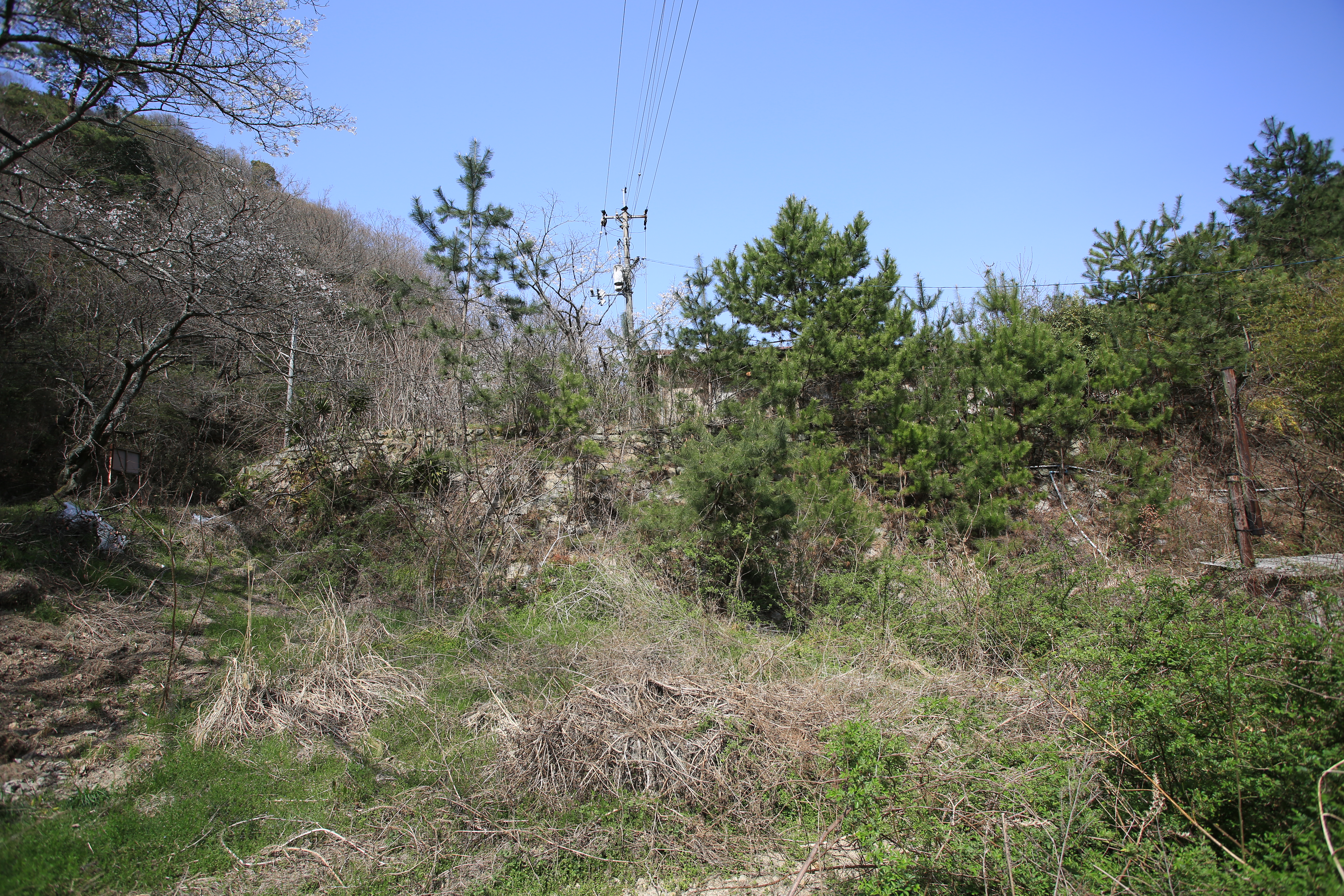 広島県福山市本郷町本郷温泉地区にある第三本郷砂留。松や雑草に覆われ、全容は見えないが、斜面になっている部分が砂留。